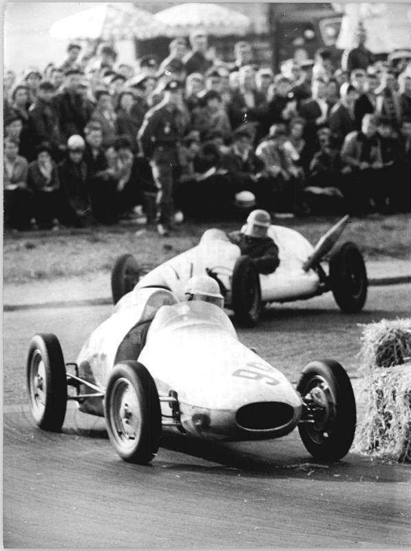 ADN-ZB Kohls 24.5.1961 Auf der "Bernauer Schleife" am Start ... sind am 28.5.1961 beim 7. Rennen für Wagen und Motorräder vor den Toren Berlins neben der DDR-Elite bekannte Fahrer aus Westdeutschland und dem Ausland. Im Meisterschaftslauf der Formel-Junior-Rennwagen sind nach dem Sieger des ersten Meisterschaftslaufes auf der Halle-Saale-Schleife. Willy Lehmann (MC Halle), die Dresdner Heinz Melkus und Siegmar Bunk (beide MC Post Dresden) Anwärter auf vordere Plätze. In den Meisterschaftsläufen der Motorräder 125 ccm und 250 ccm gehört Werner Musiol (MC Ludwigsfelde) zu den Favoriten. (Achtung Redaktionen: Die Aufnahmen sind von der Halle-Saale-Schleife. Die Fahrer starten auf der Bernauer Schleife mit den gleichen Startnummer). UBz: Willy Lehmann (MC Halle)"